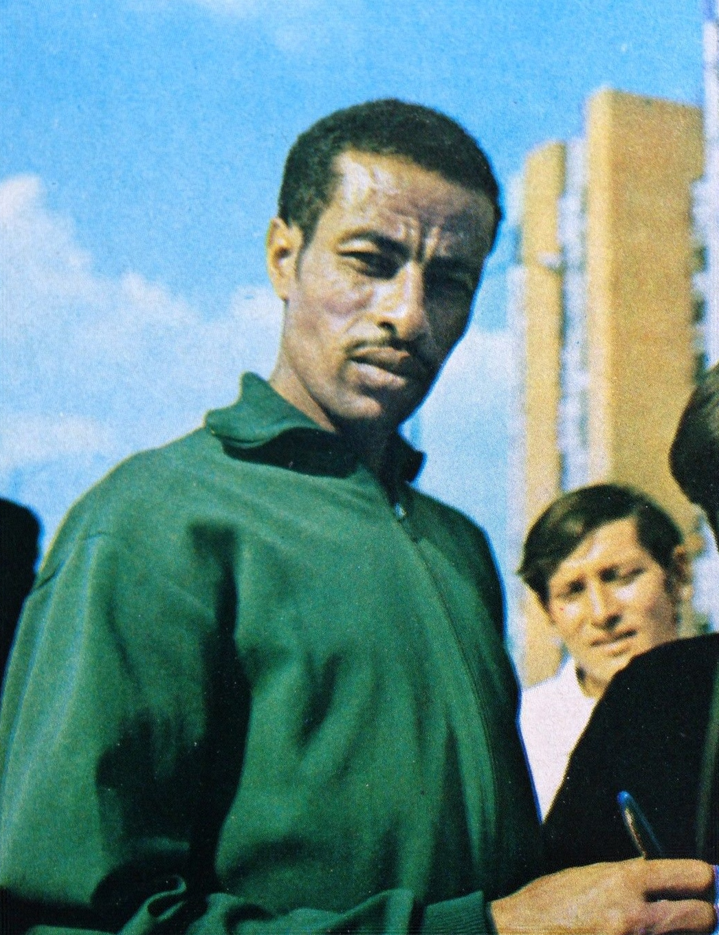 IL MONELLO OLIMPIADI CENTO MEDAGLIE 1972 n.6 BIKILA , Figurina Calciatori NEW